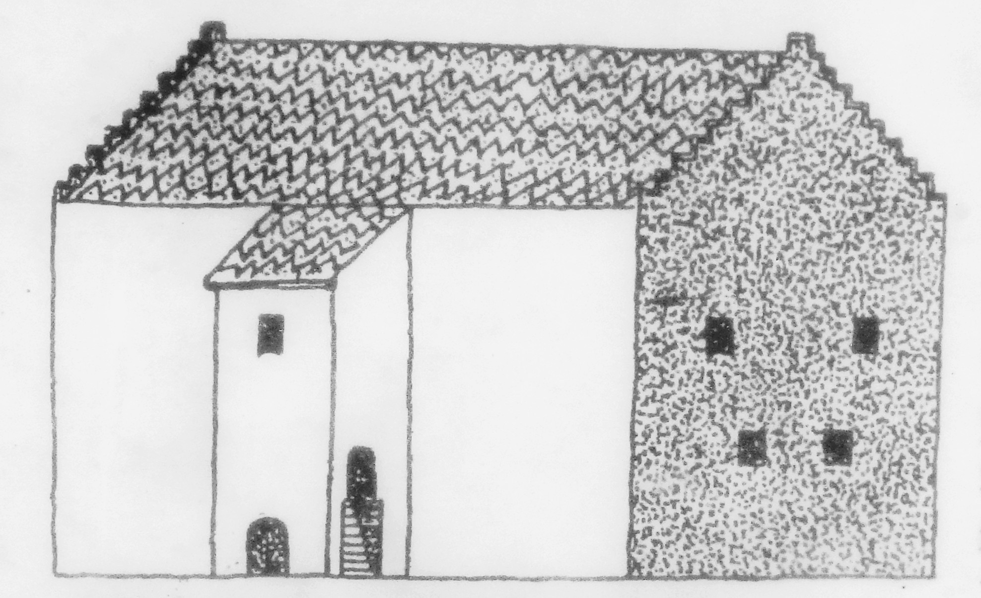 Ervalla hus, ritning från 1761